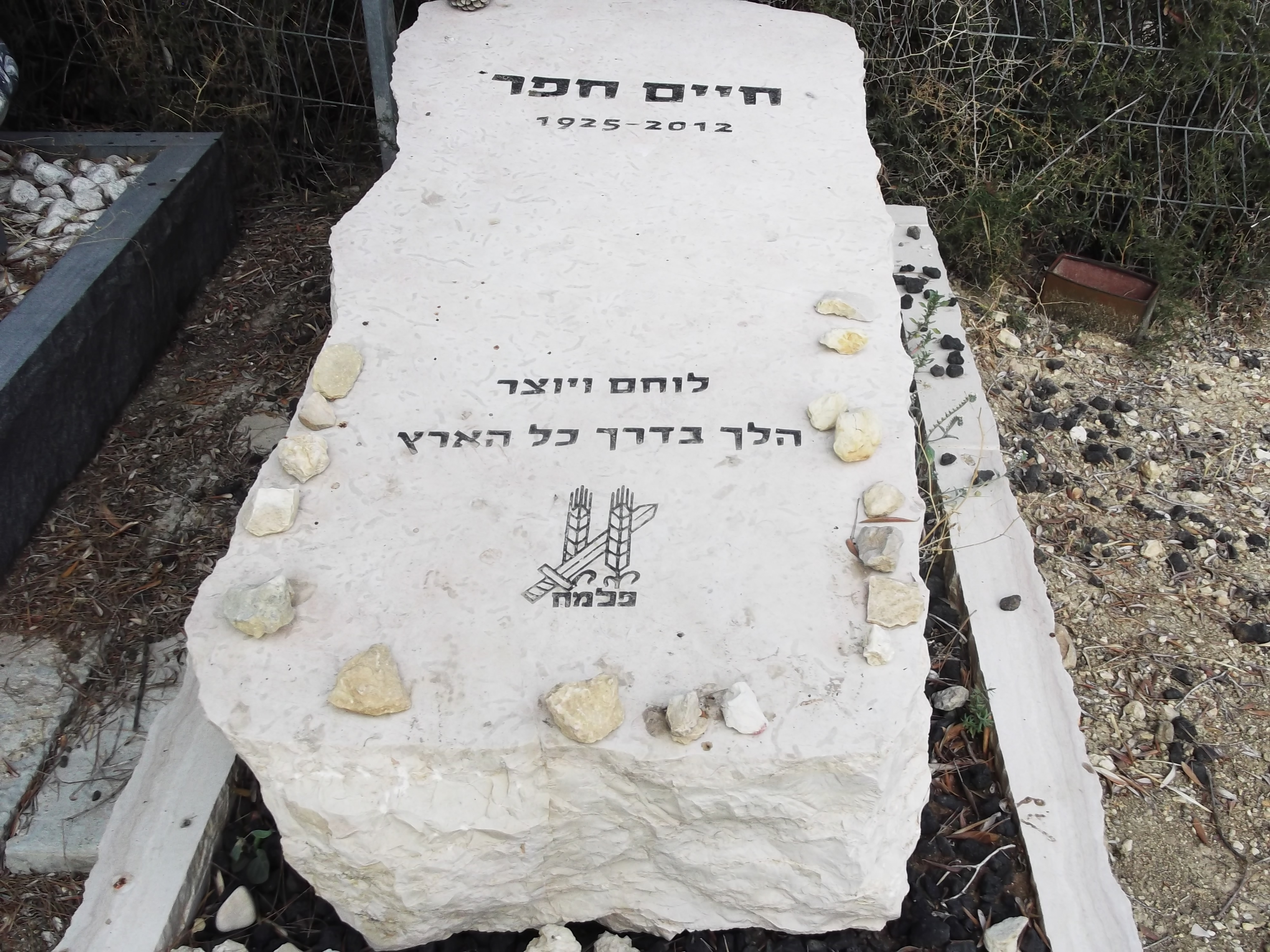 קברו של המשורר חיים חפר בעין הוד